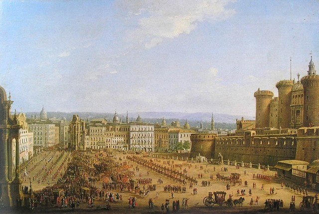 Antonio Joli - Napoli, carnevale al Largo di Castello. Luogo di esposizione sconosciuto.